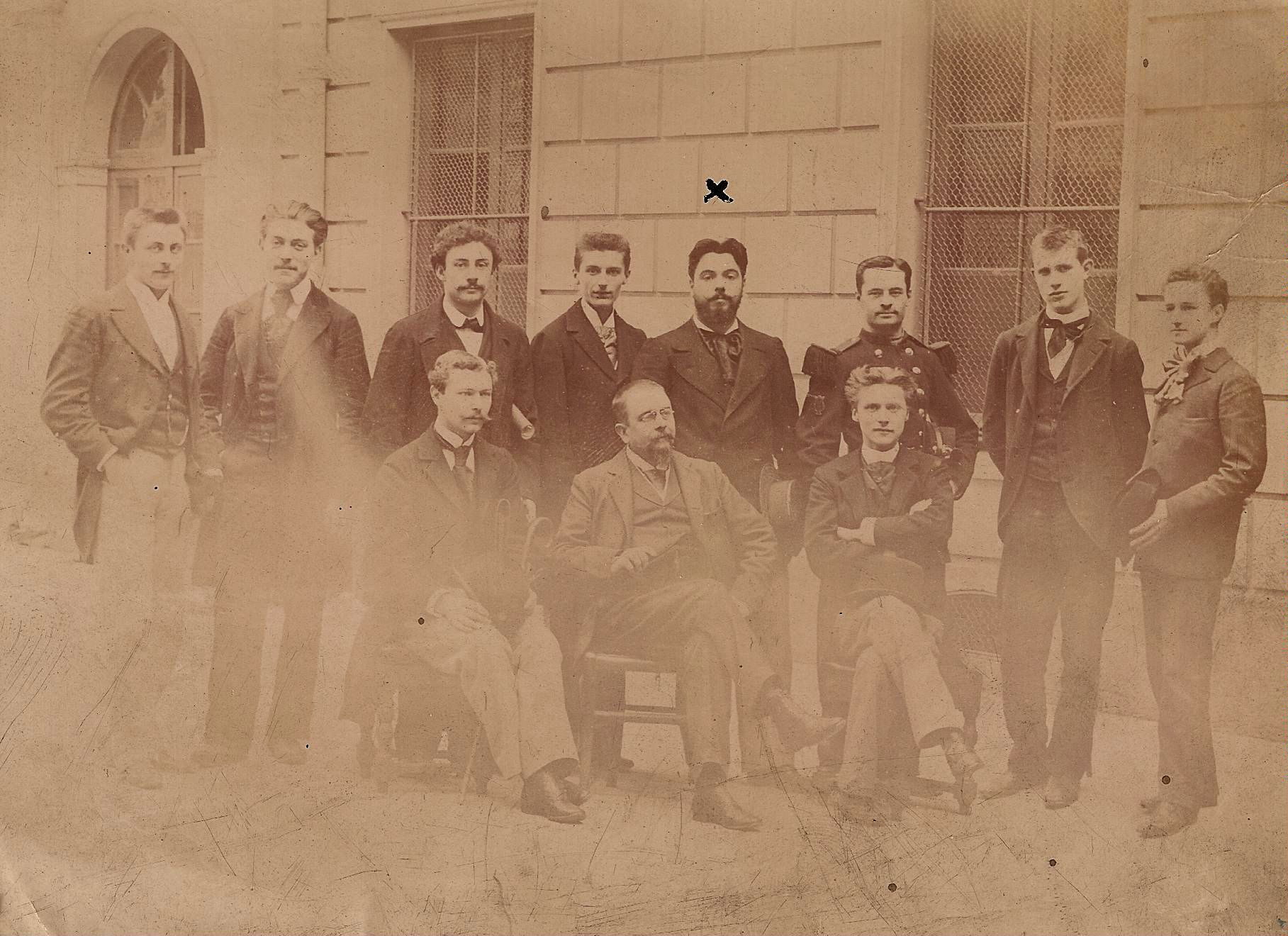 Francis Casadesus dans la classe d'Albert Lavignac